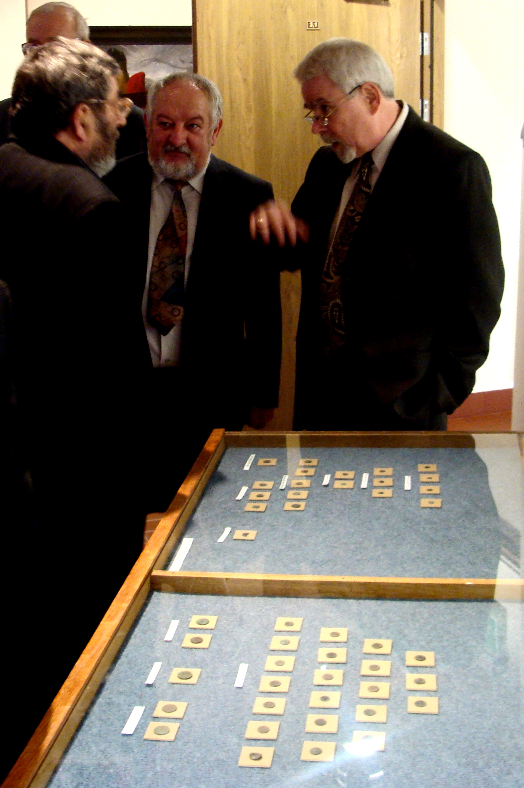 Münzen von Mittelalter bis zur Gegenwart beim Graben auf dem Alten Friedhof in Sanok gefunden.